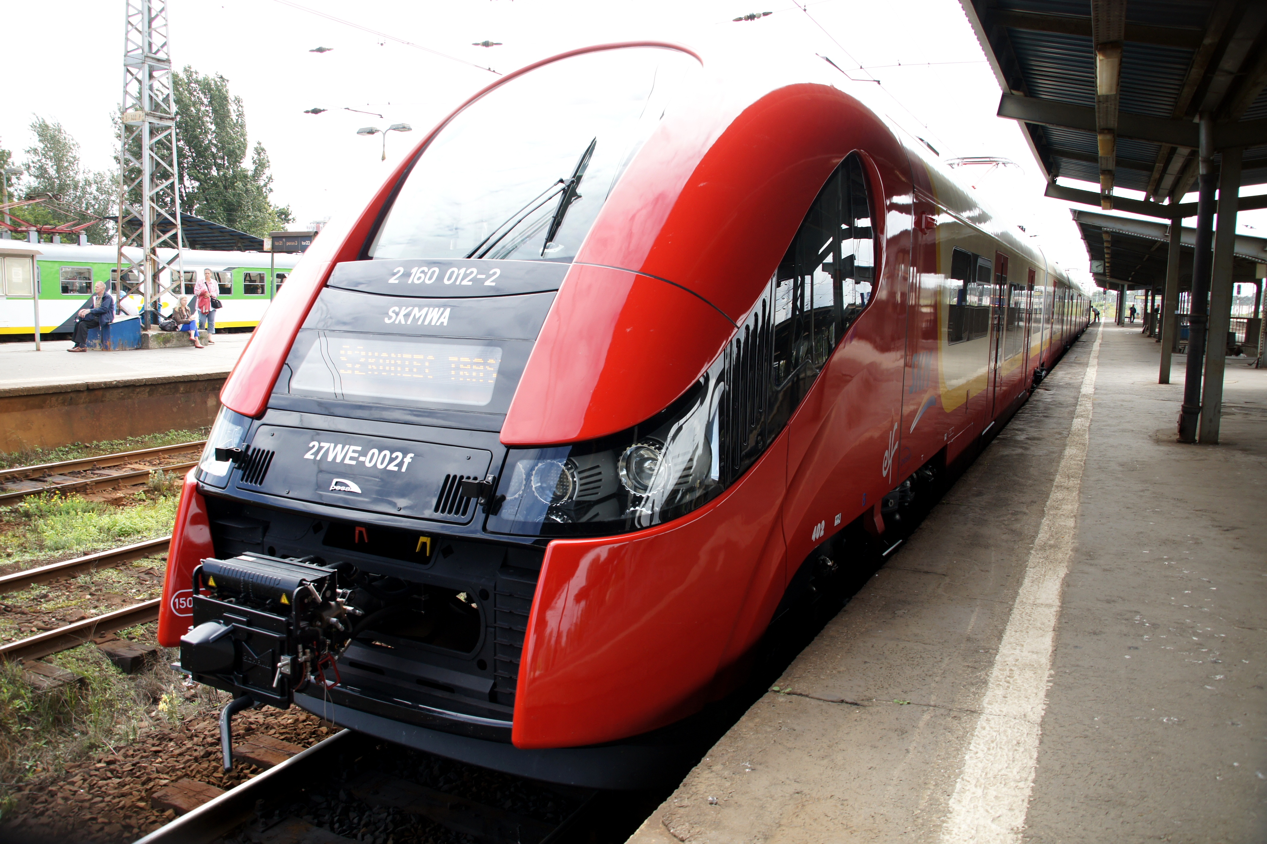 Pociąg 27WE "Elf" - SKM Warszawa - Postój na stacji Warszawa Zachodnia